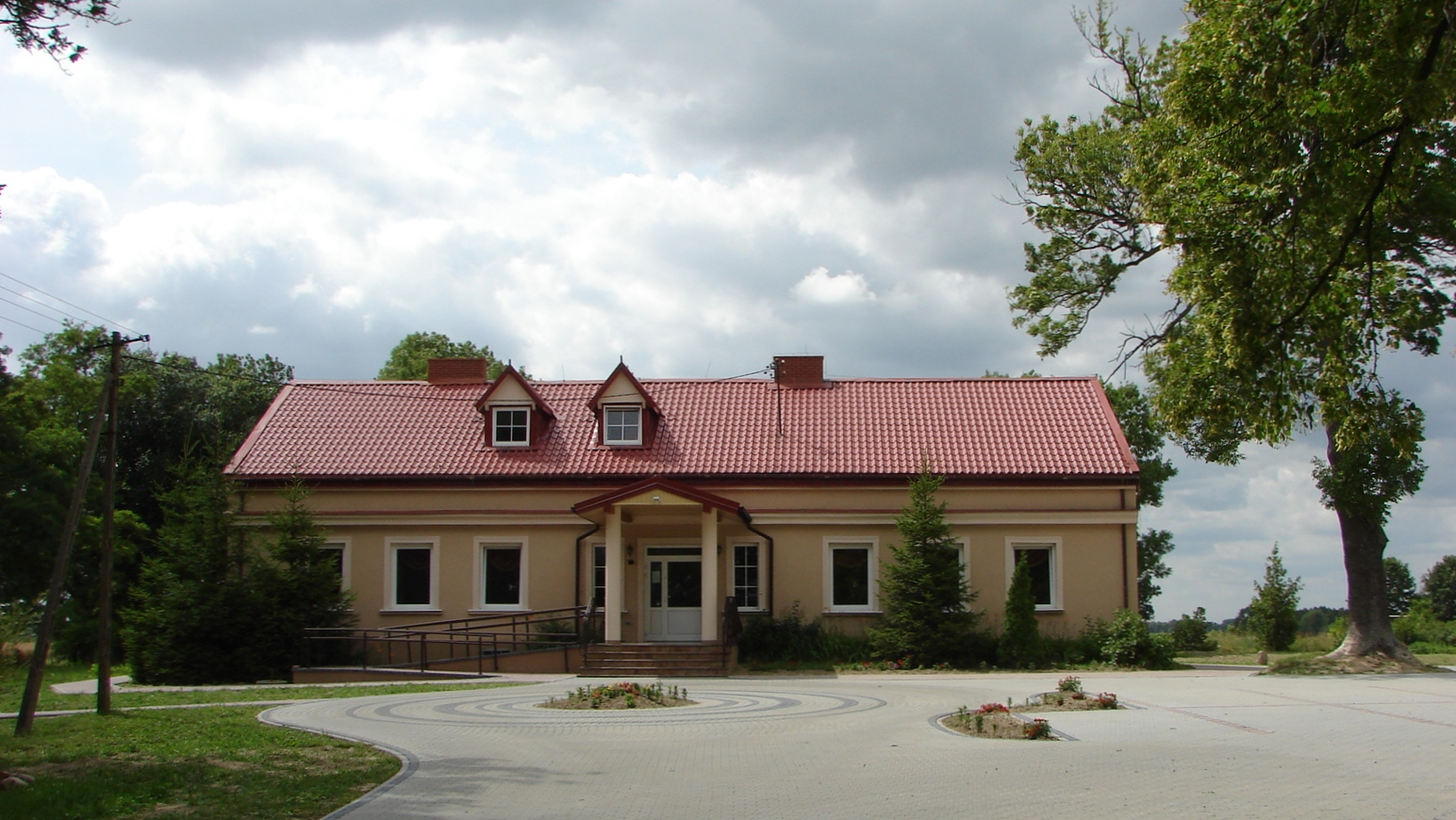 Wola Adamowa, Gmina Chodecz, dwór